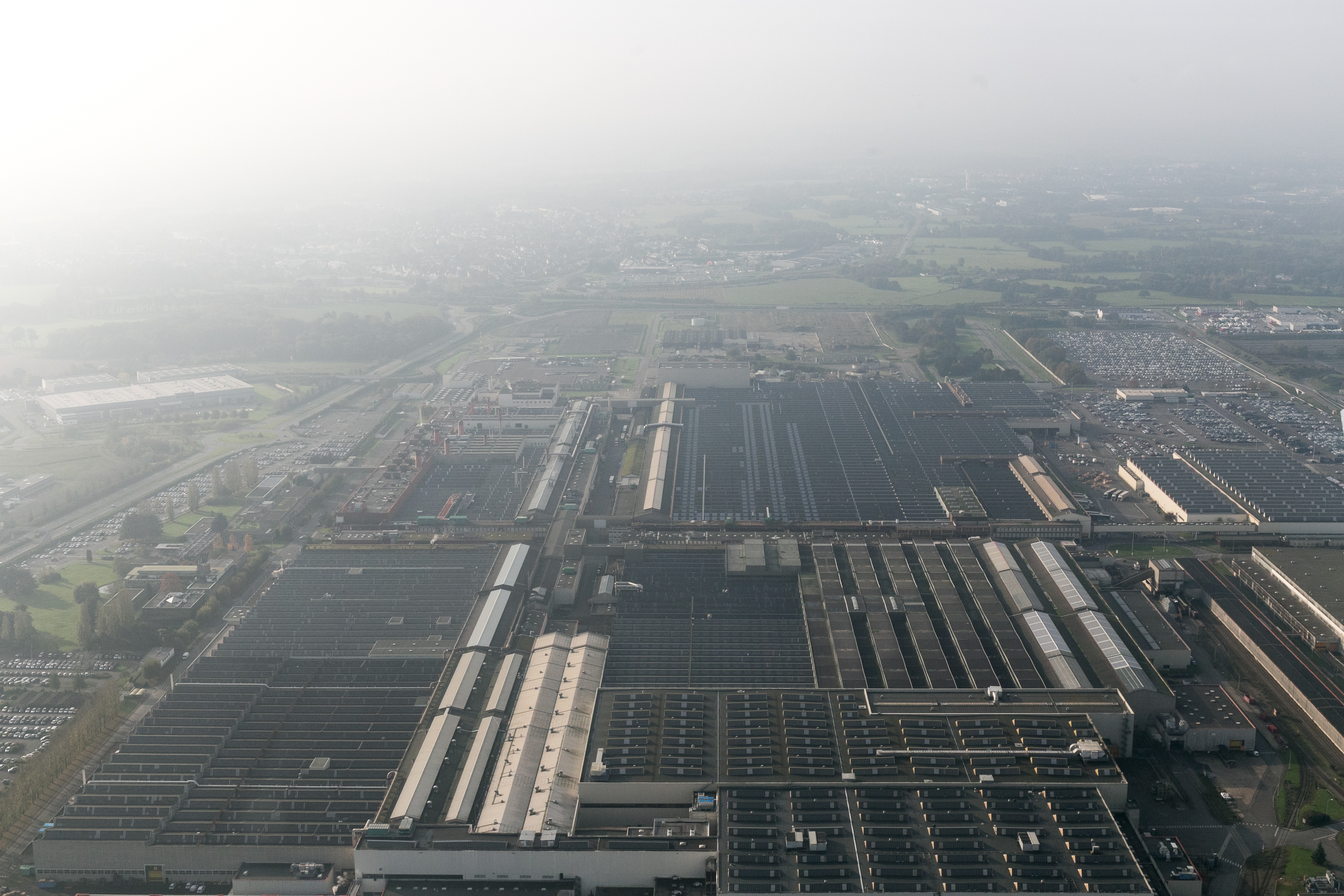 Vue aérienne de l'Usine PSA de Rennes à Chartres-de-Bretagne lors d'un vol entre RNS et CDG.